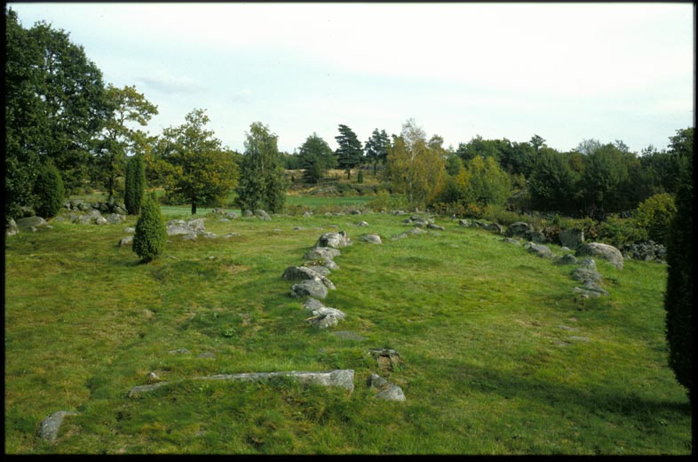 Edestad 86:1. Gravfält, bestående av 6 fornlämningar, vilka utgörs av skeppssättningar och kullfallna stenar. Motiv: Edestad 86:1 Kategori: Gravfält Edestad 86:1. Gravfält, bestående av 6 fornlämningar, vilka utgörs av skeppssättningar och kullfallna stenar.